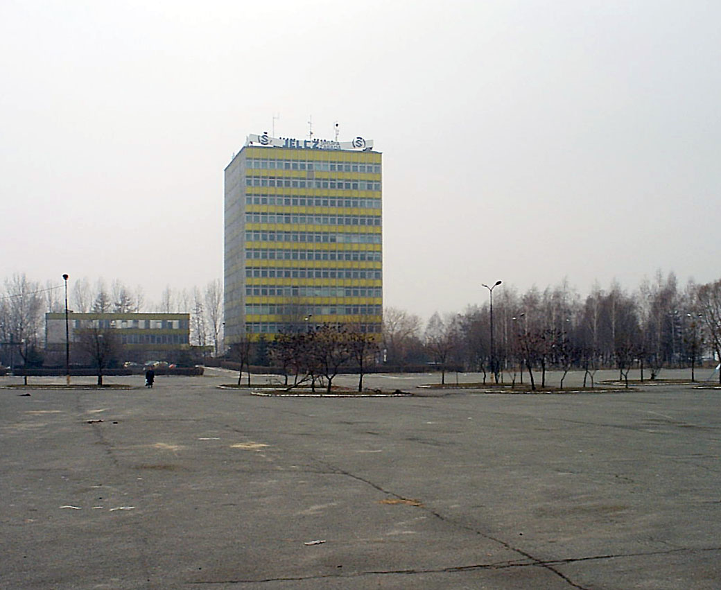 Jelcz-Laskowice, biurowiec ZS Jelcz, tzw. BOT. Autor: Sebastian Maćkiewicz.